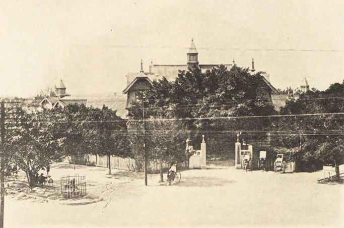 臺灣總督府臺中醫院，現為衛福部台中醫院